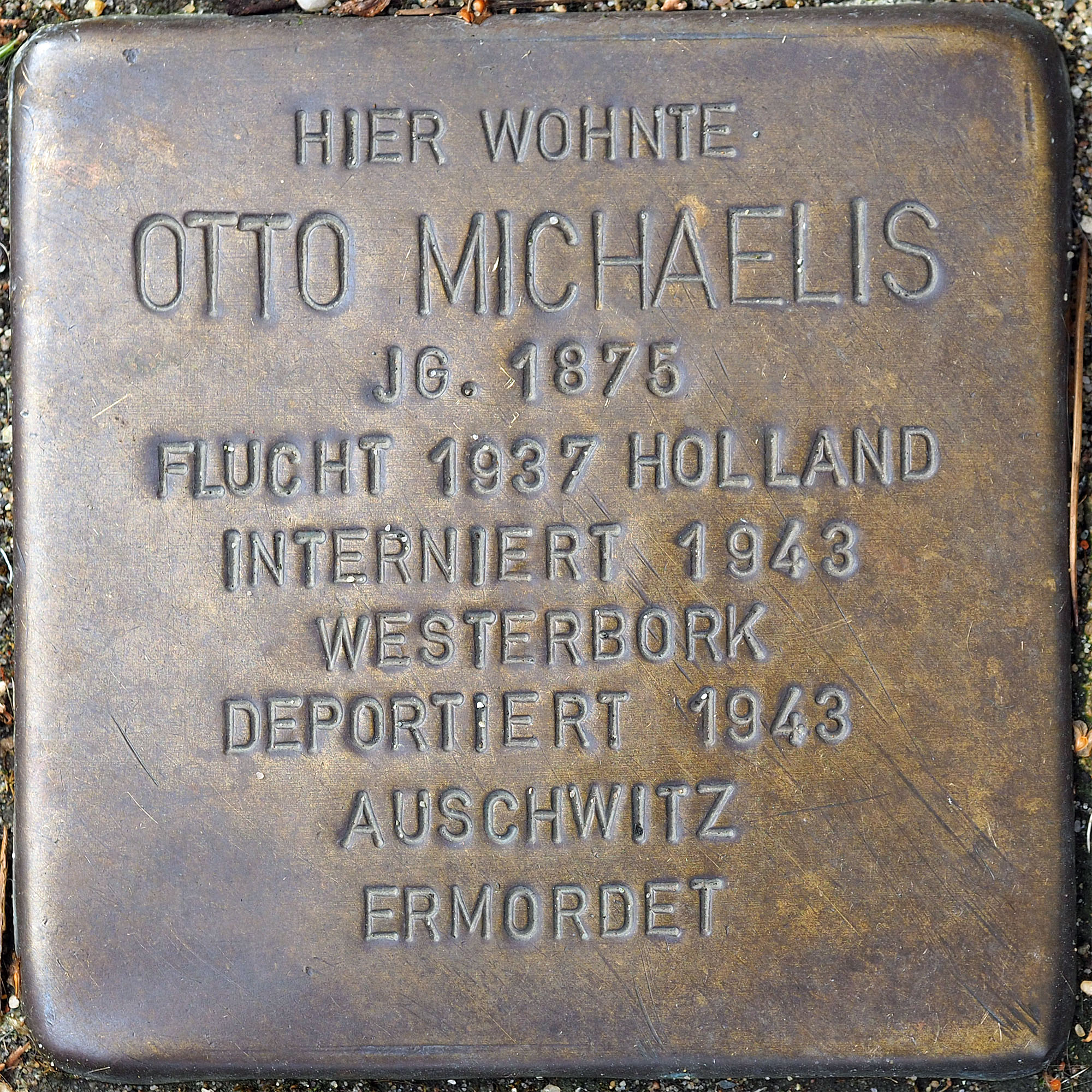 Stolpersteine MG: Michaelis, Otto